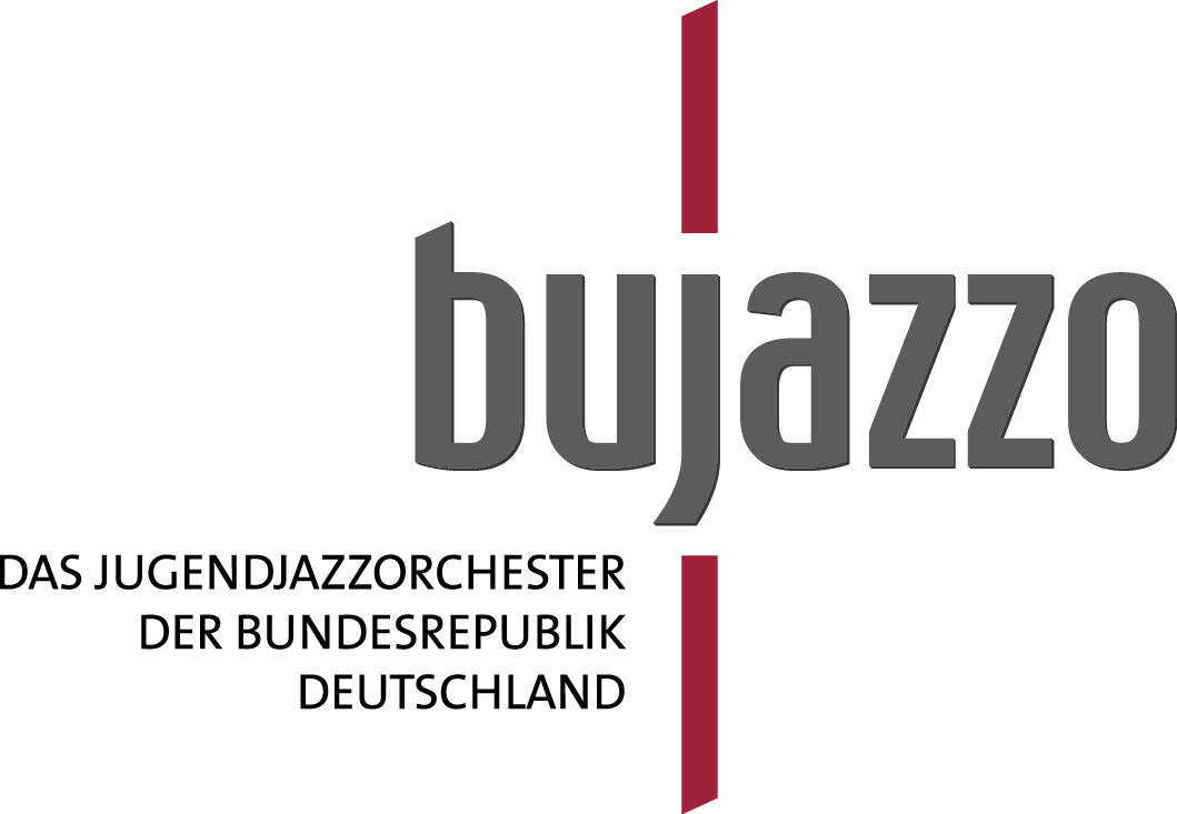 Logo des Bundesjazzorchesters